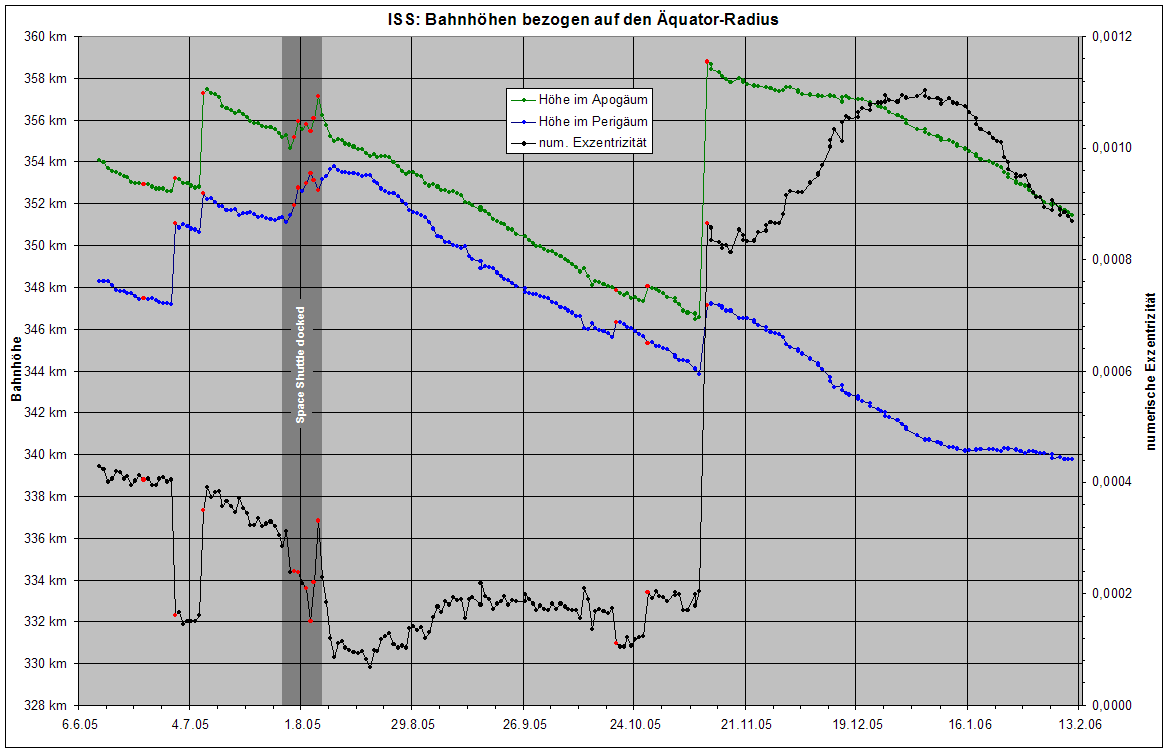 Internationale Raumstation: Verlauf der Bahnhöhen